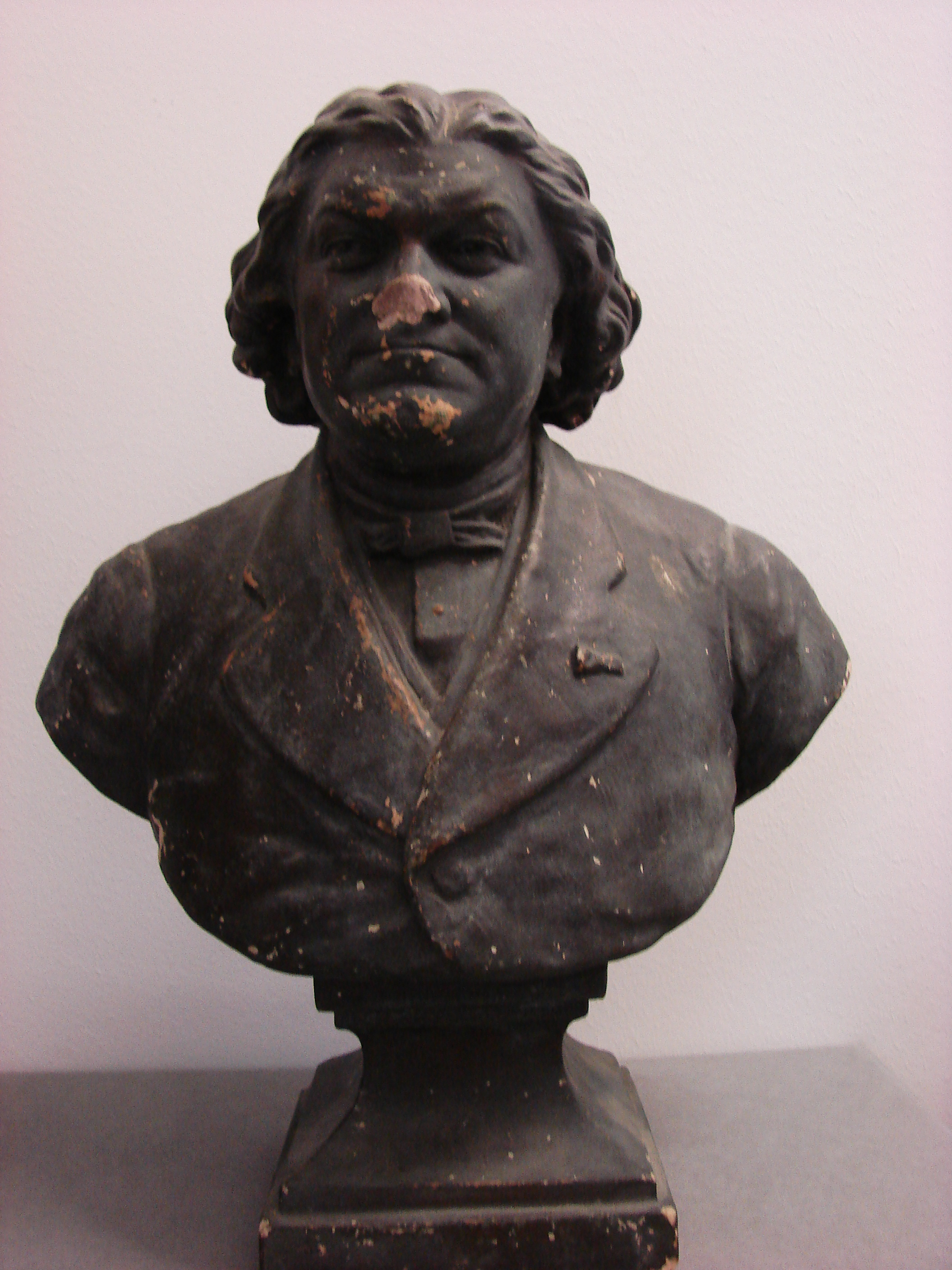 Buste en plâtre de l'horloger Antoine Rédier.. Collection du musée de l'horlogerie de Saint-Nicolas d'Aliermont. Inv : 2013.0.5